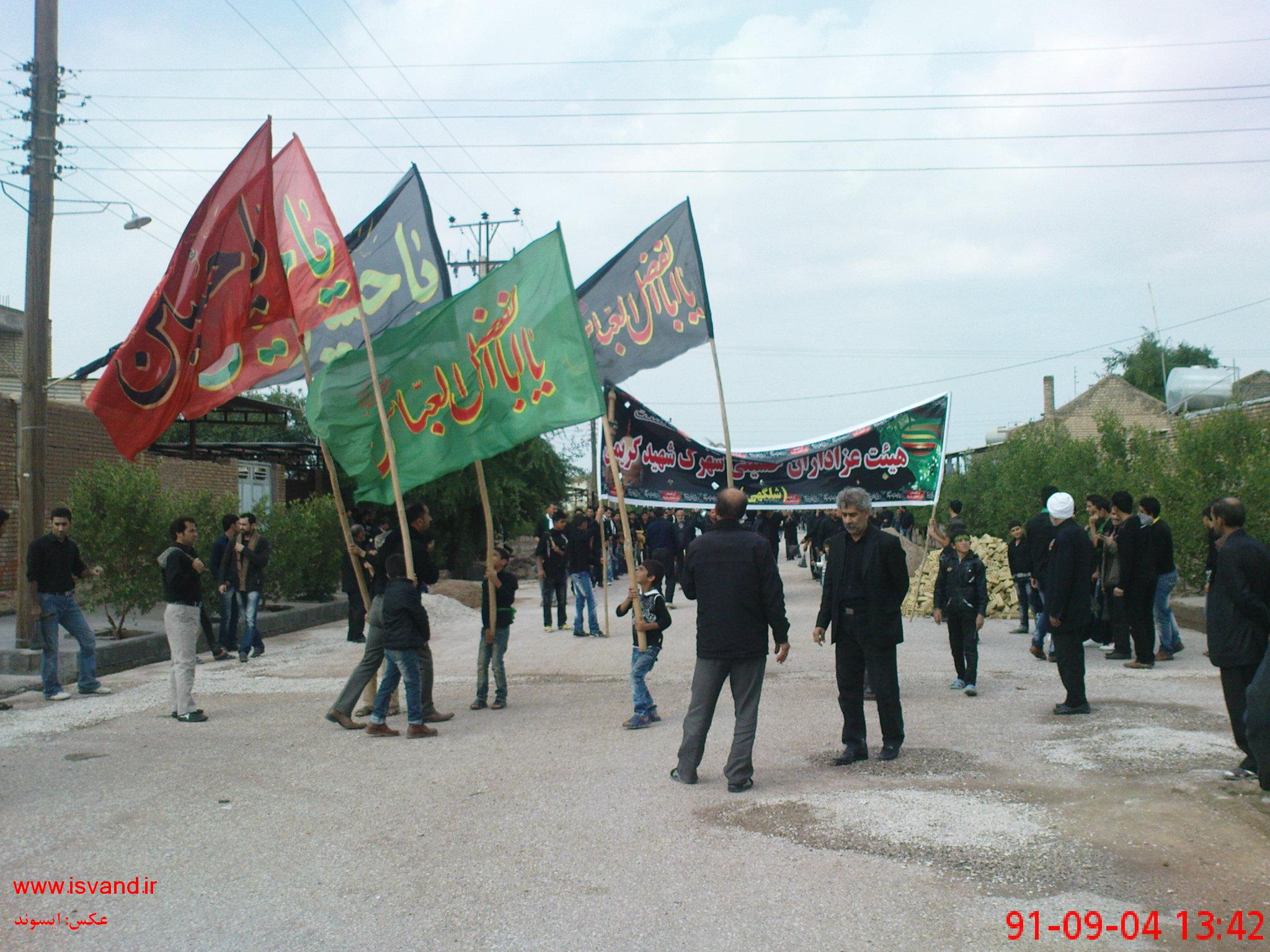 تاسوی حسینی 91 در شلگهی